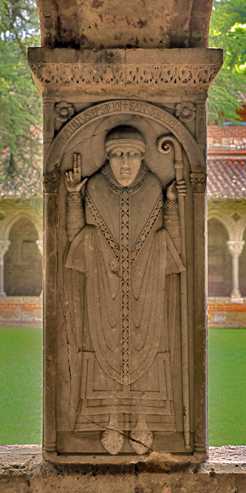 Moissac (Tarn-et-Garonne, France), ancienne abbaye St Pierre, dans le cloître pilier angulaire dont les bas-reliefs sont des remplois de cuves de sarcophages de 1100 environ.